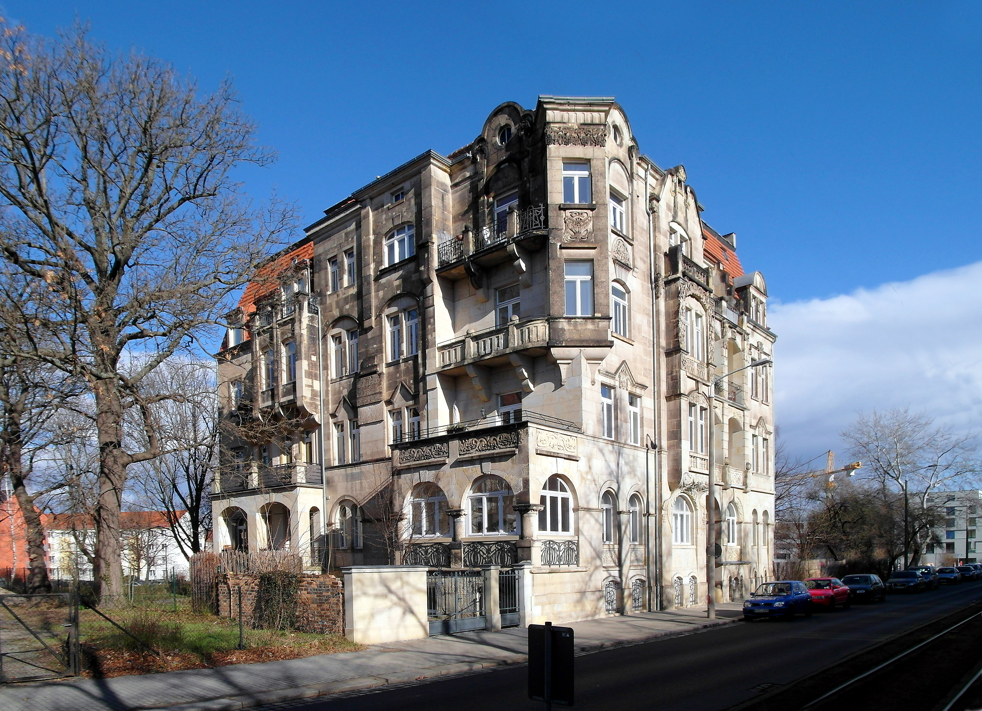 13.02.2014 01187 Dresden-Südvorstadt: Jugendstil-Mietshaus Münchner Straße 26 (GMP: 51.030770,13.722992). Erbaut 1903 für den Architekten und Baumeister Curt Hermann Praetorius. [SAM1765+1770.JPG]20140213010MDR.JPG(c)Blobelt